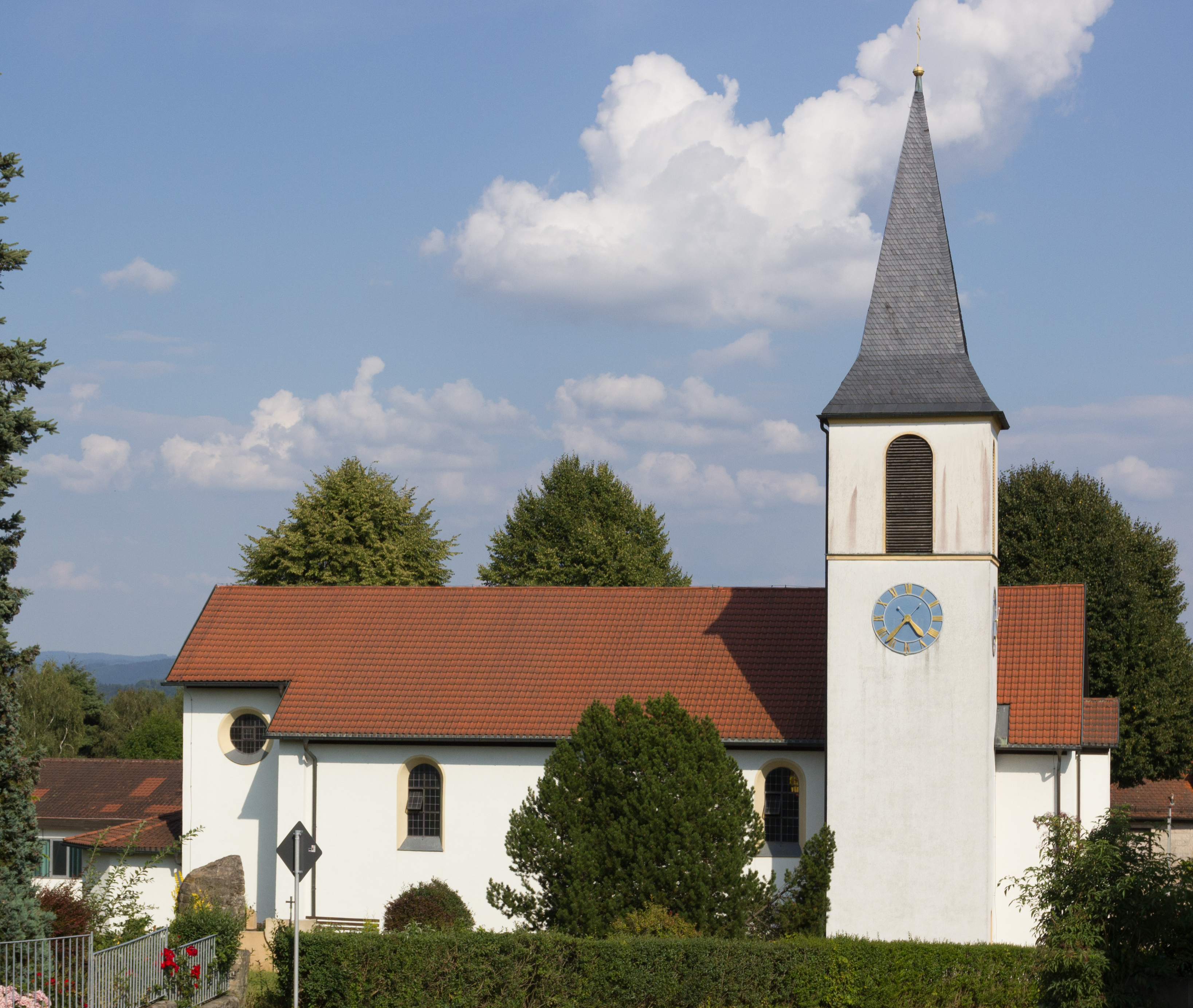 Katholische Pfarrkirche St. Bonifatius, Breitenloh 118, Gehülz, Kronach